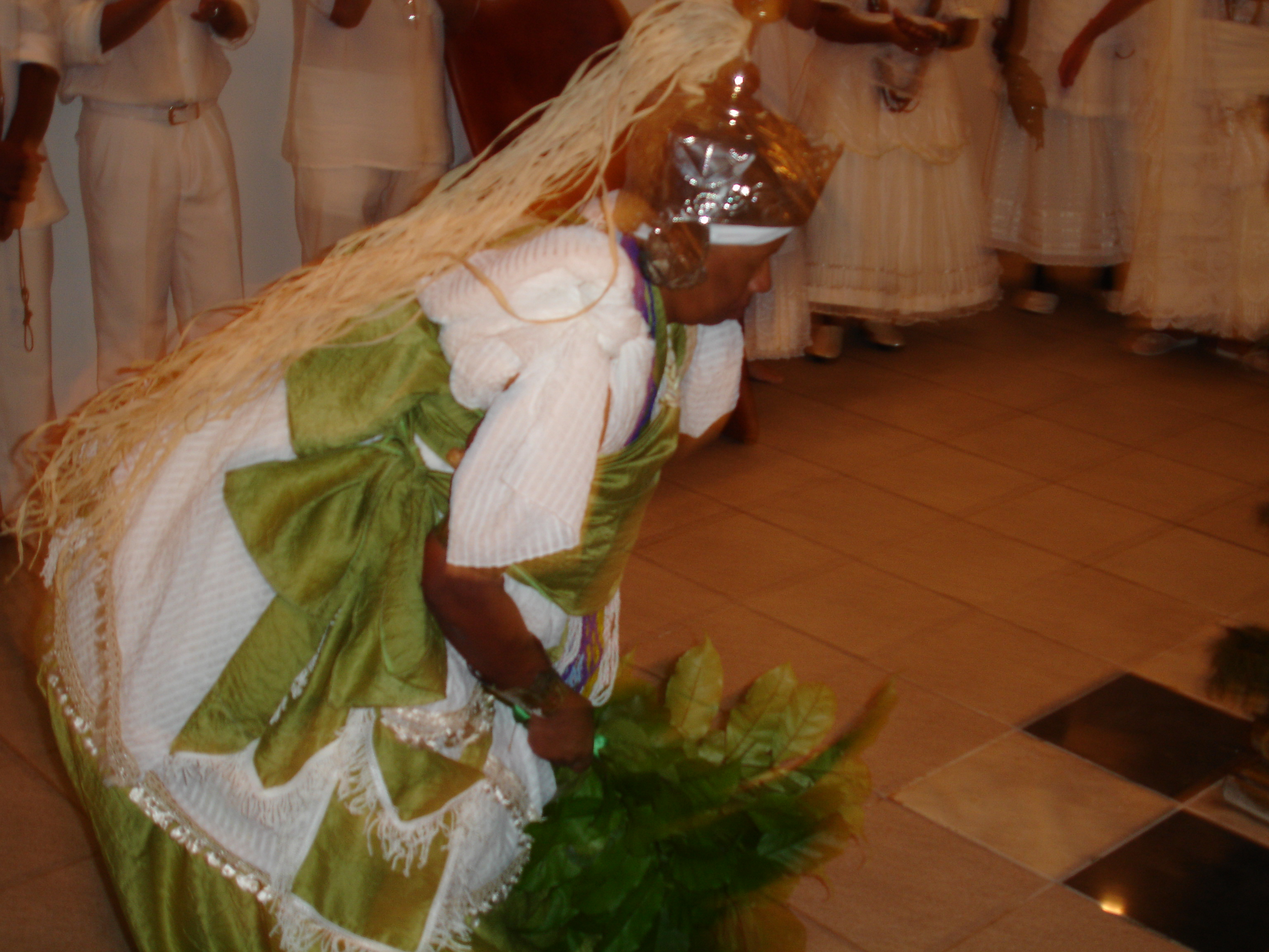 Ossain Orixa das folhas, Candomblé, Bahia, Brasil